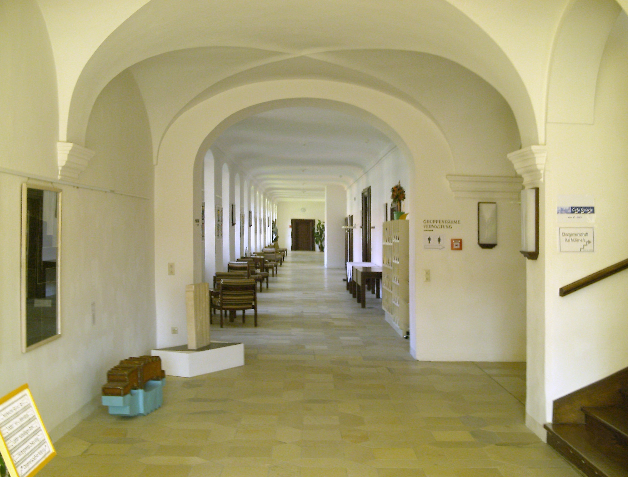 Kloster Obermarchtal, Alb-Donau-Kreis, Oberschwaben, Deutschland